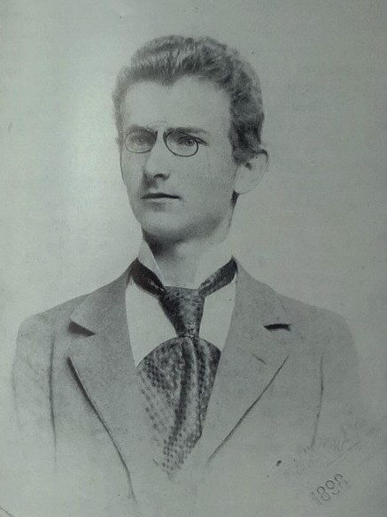 Ladislav Zelenka (1881-1957), český violoncellista a hudební pedagog